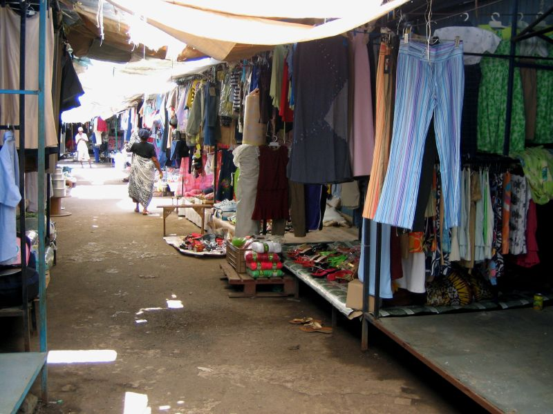 Marché de Mamoudzou, à Mayotte